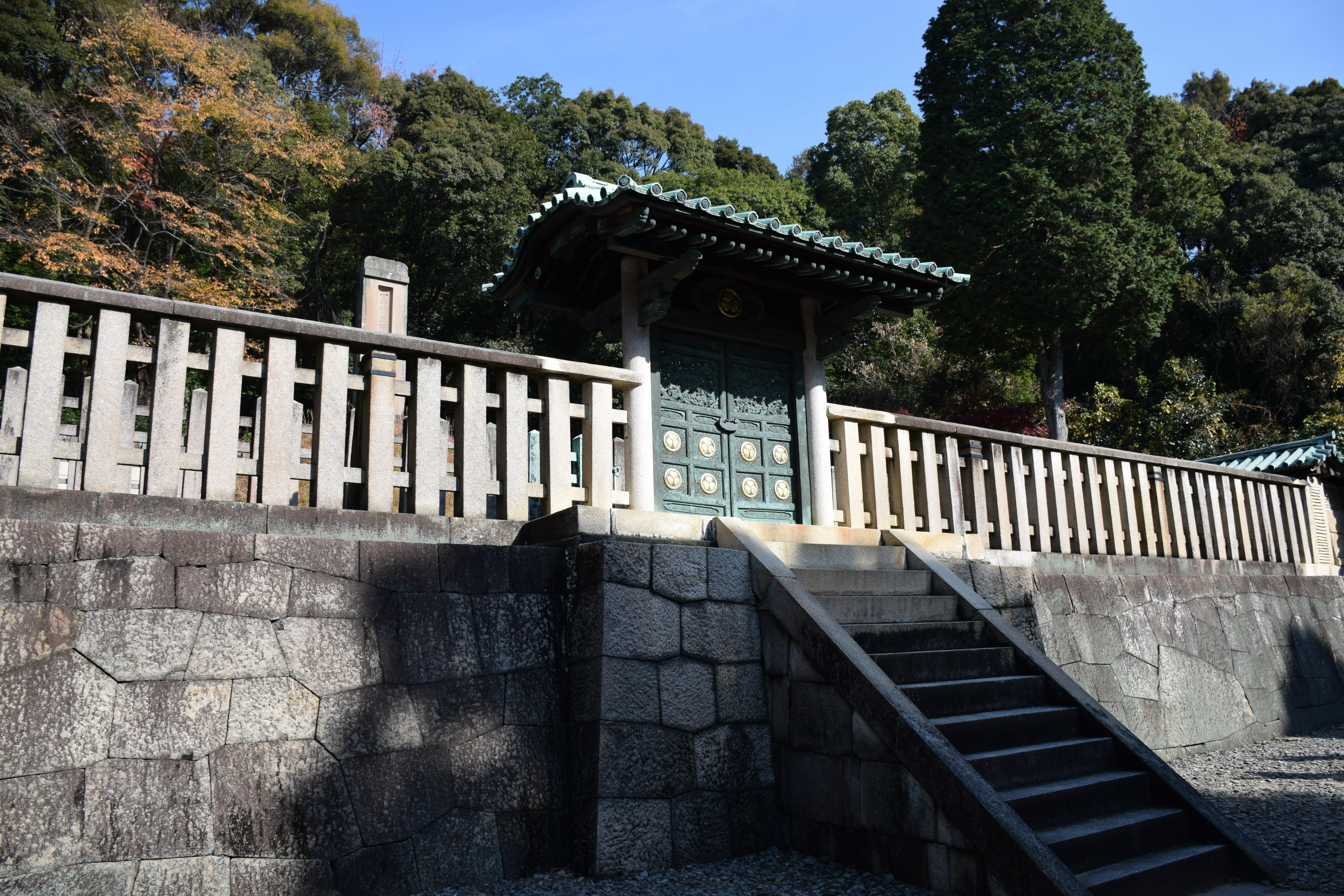 定光寺唐門